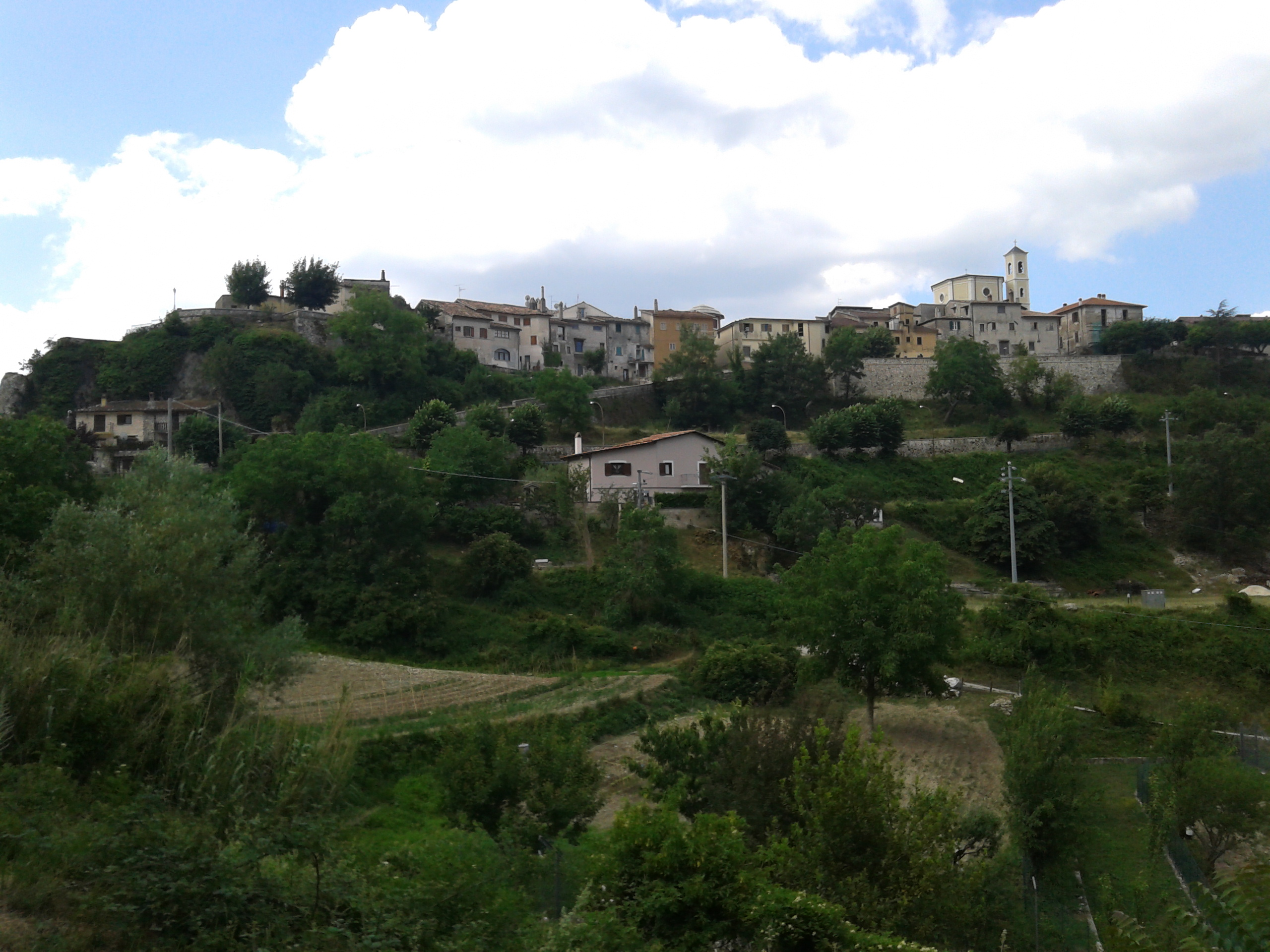 Foto panoramica di Civita d'Antino